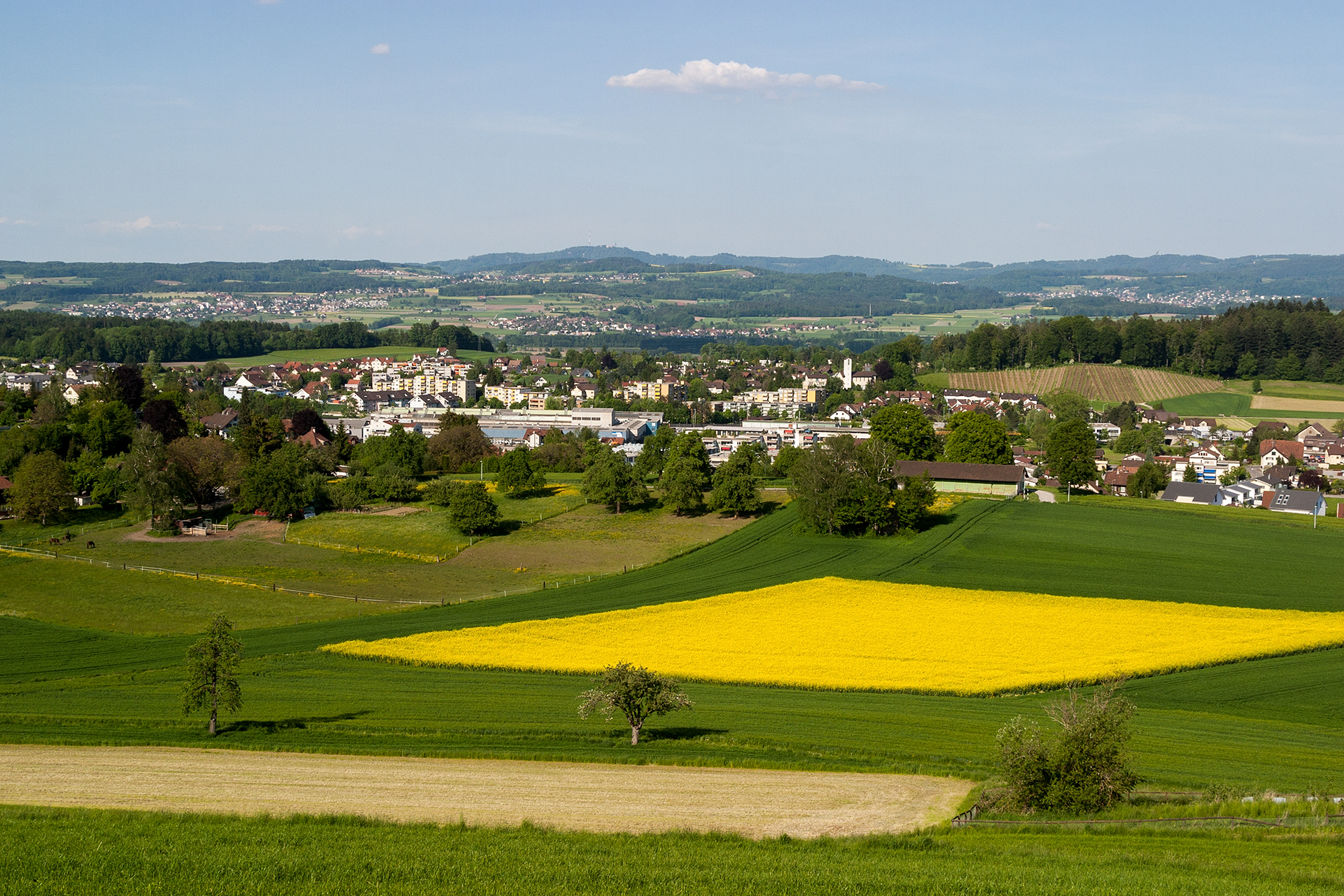 Muri (AG)